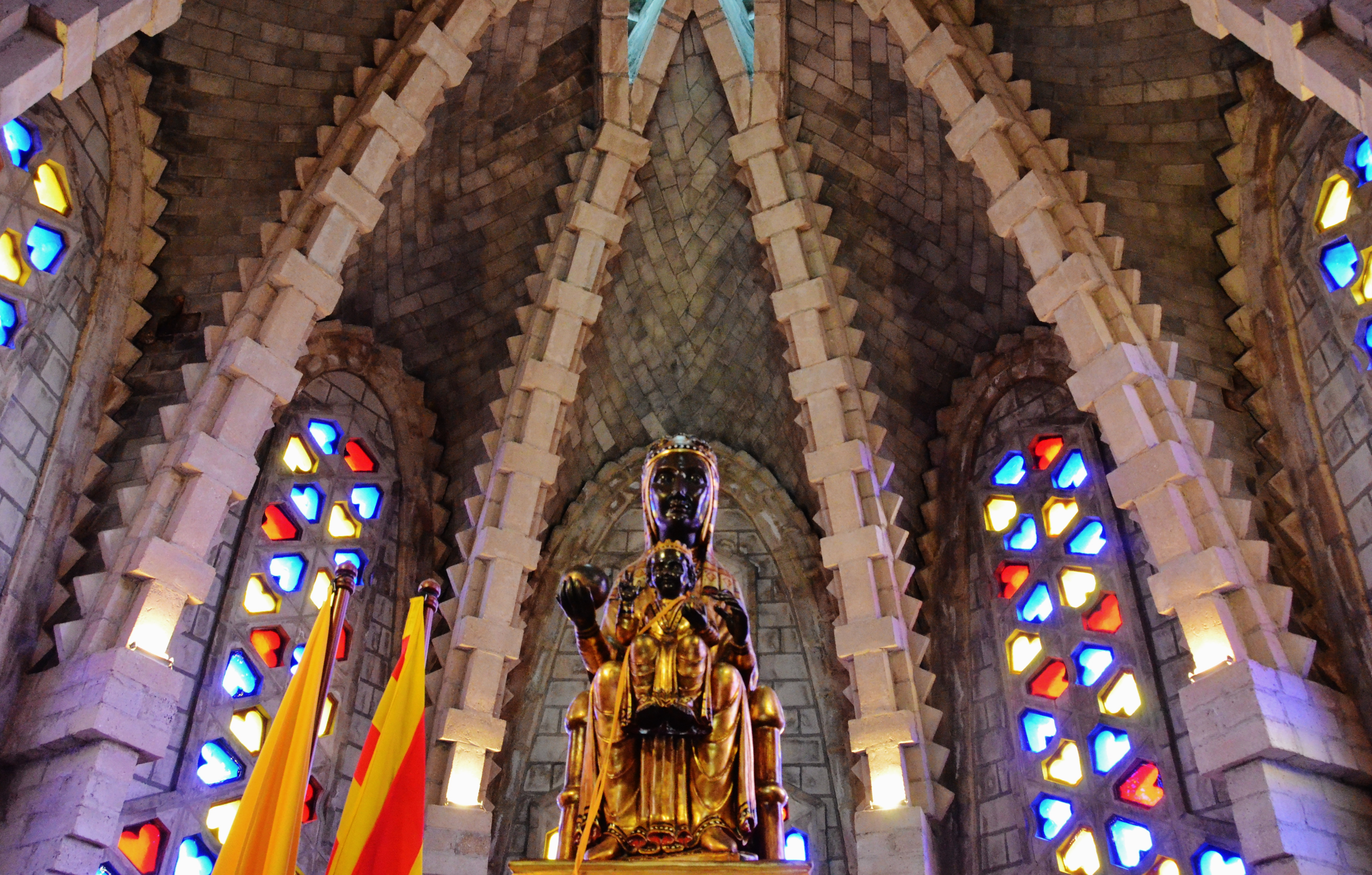 Cameri del Santuari de la Mare de Déu de Montferri, Alt Camp